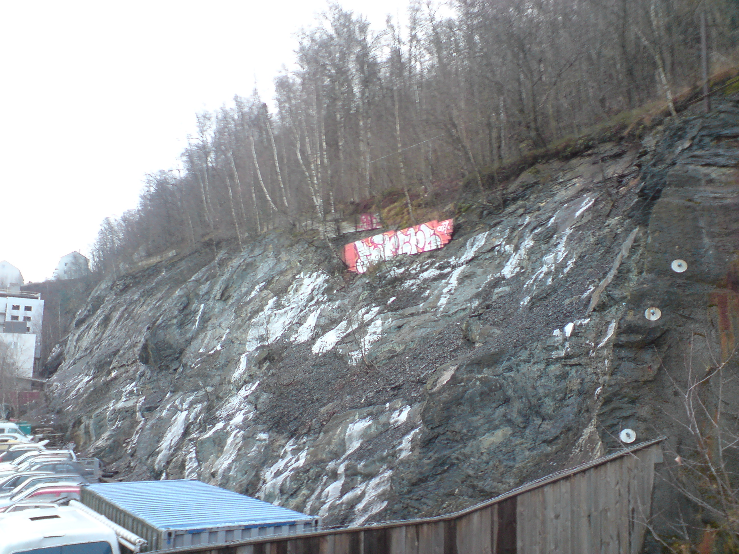 Merker i fjellet langs Konows gate etter uttak av alunskifer. Alunverket lå på Ekebergskrenten / Grønlia, Oslo